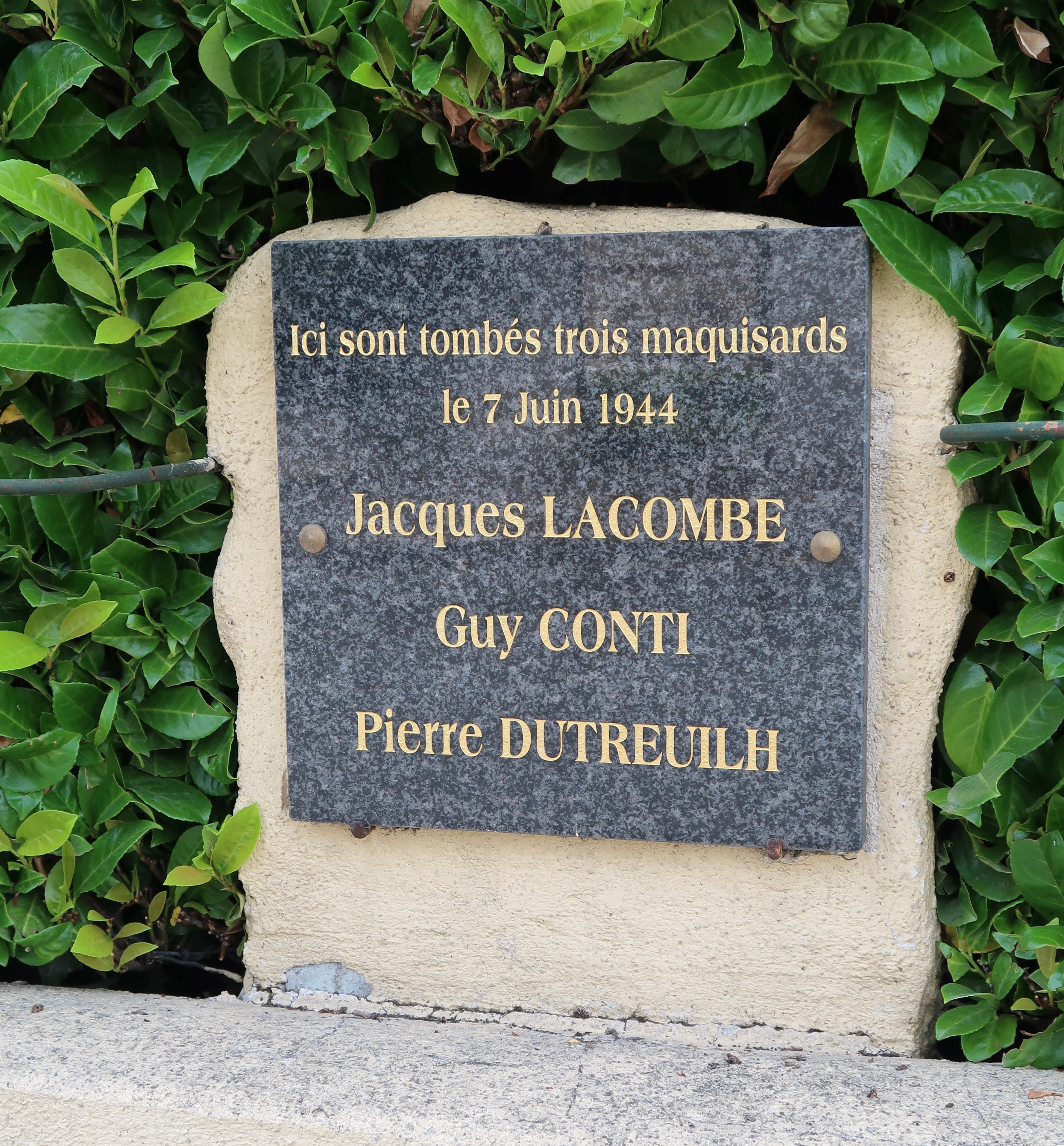 Plaque en hommage à trois résistants, rue du Capitaine-Coste, Le Fleix (Dordogne). Texte : "Ici sont tombés trois maquisards le 7 juin 1944 Jacques Lacombe Guy Conti Pierre Dutreuilh"